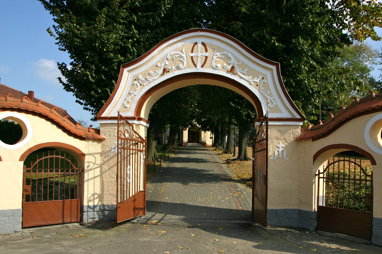 Pokrzywnica - rzymskokatolicki kościół parafialny p.w. św. Sebastiana